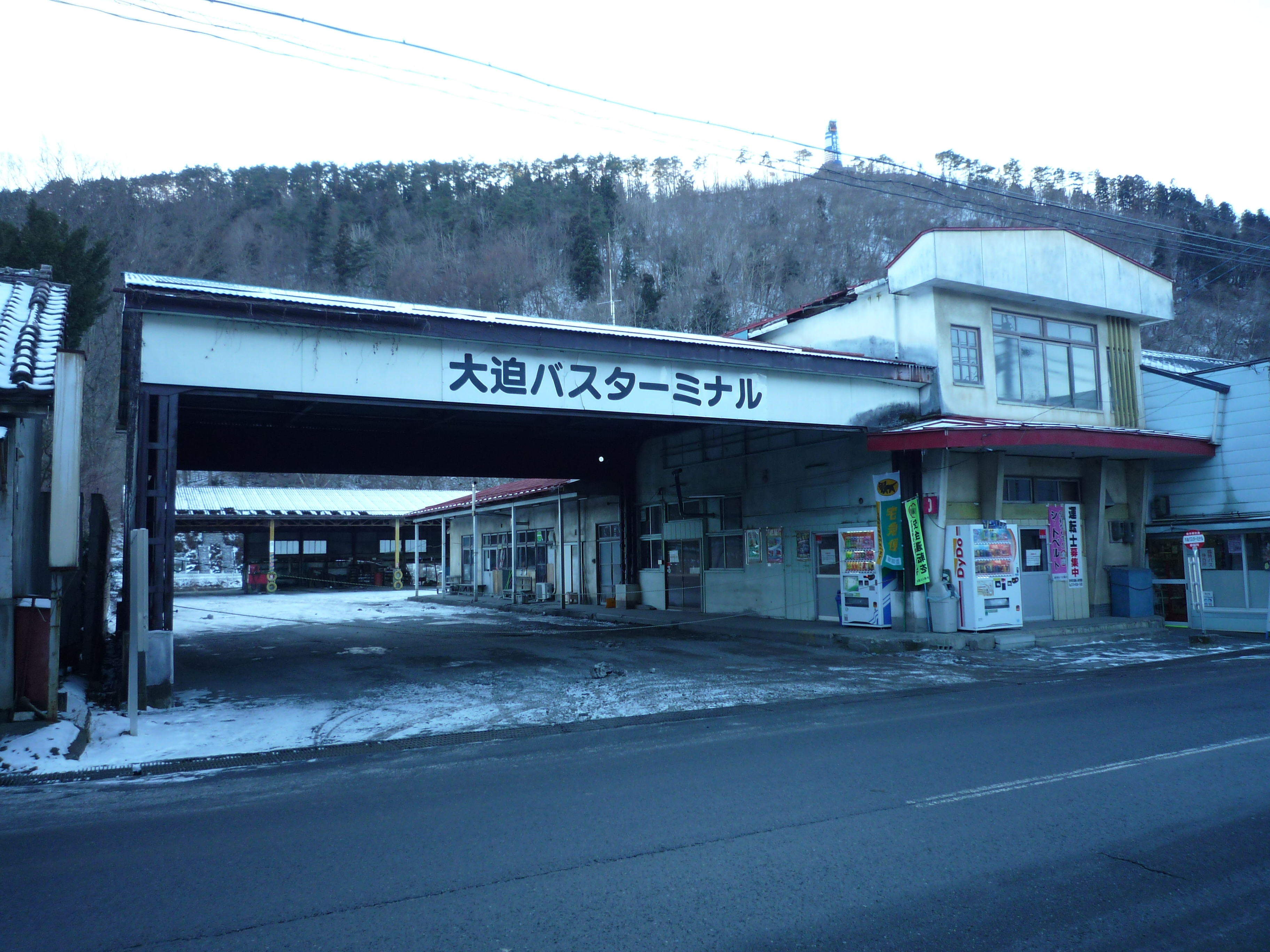 バスの出入口はロープで張られ、停留所が設置されている